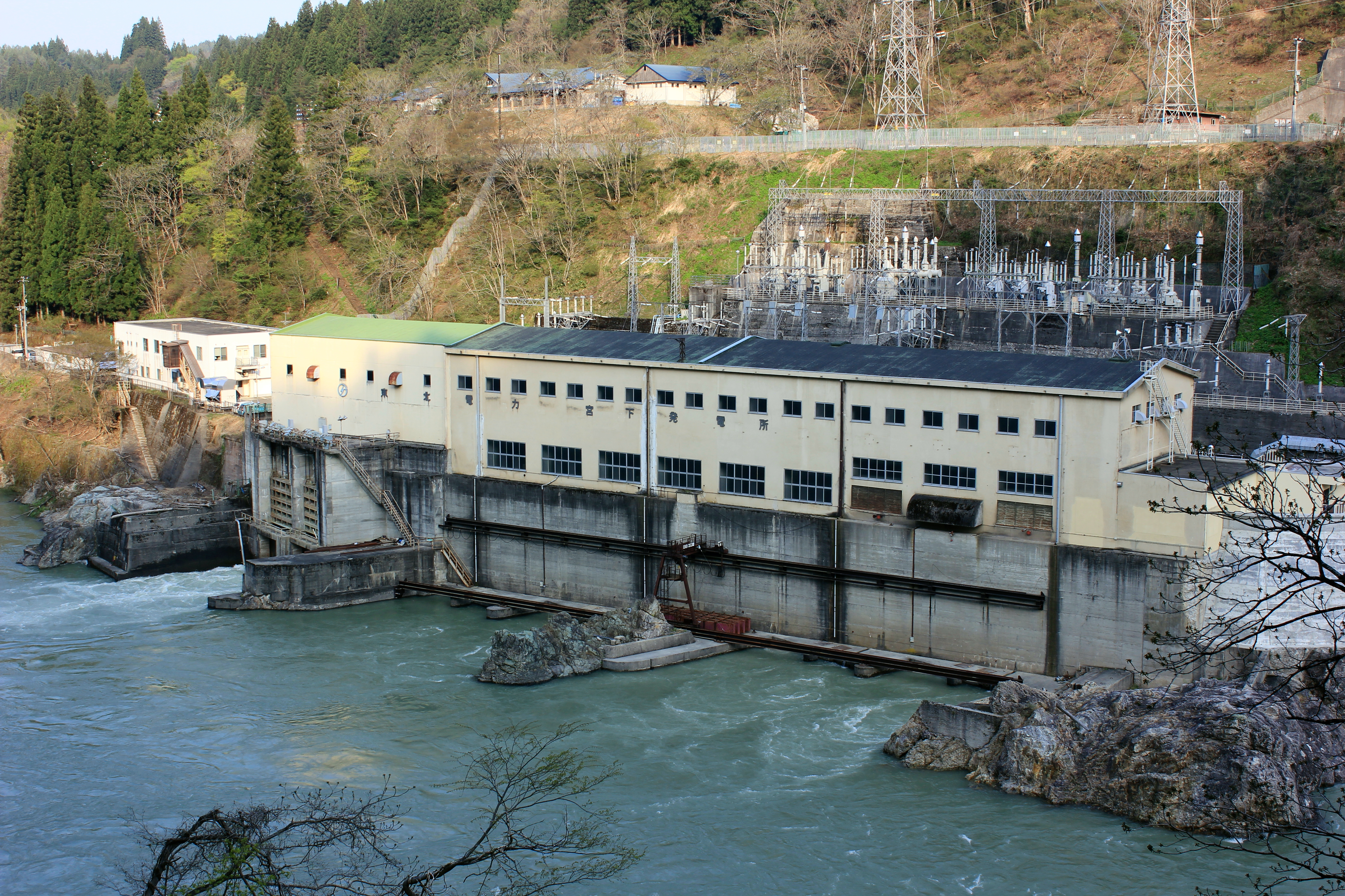 宮下発電所（福島県・只見川。東北電力株式会社管理）